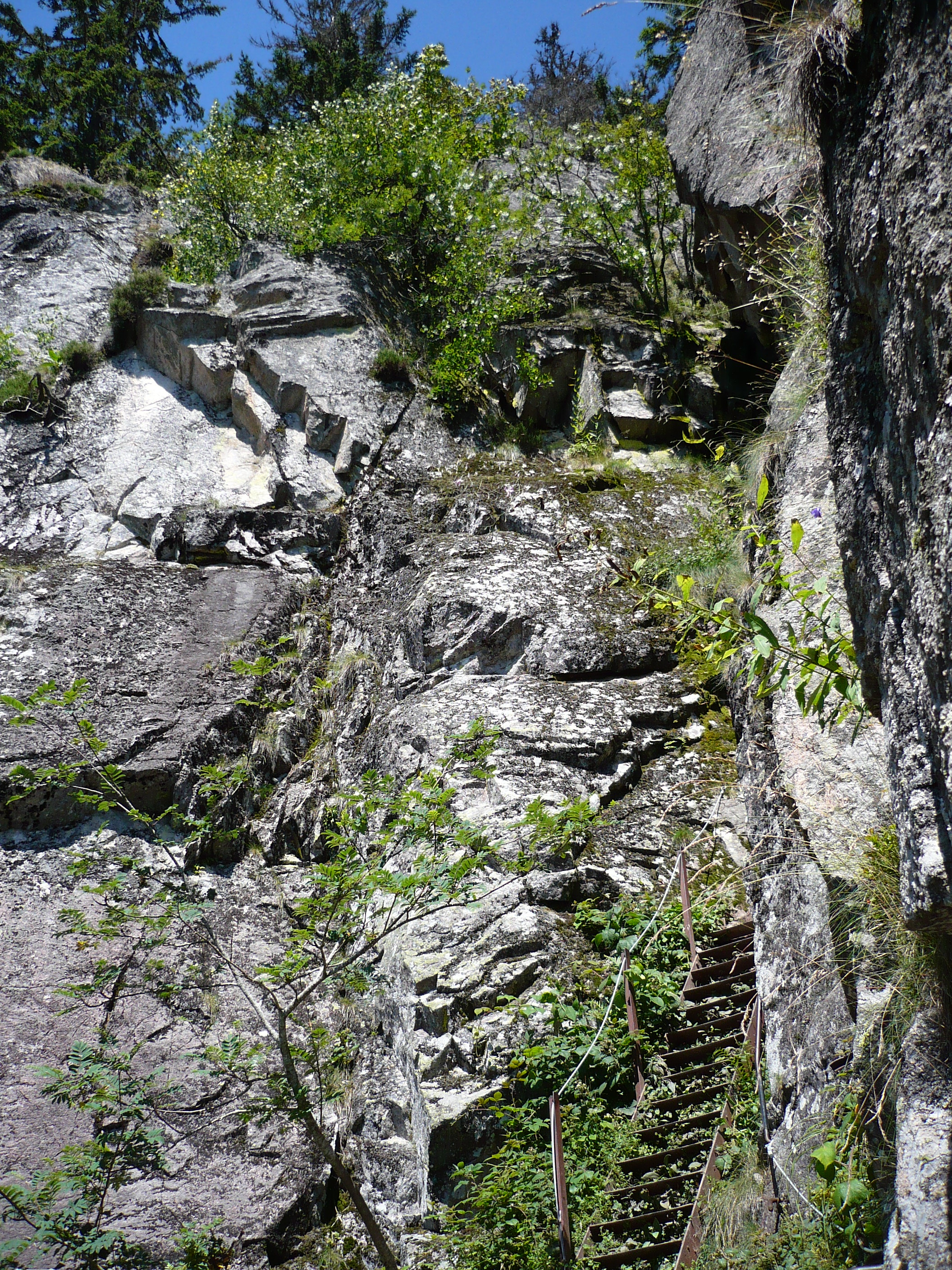 Treppe auf dem Sentier des Roches, Vogesen